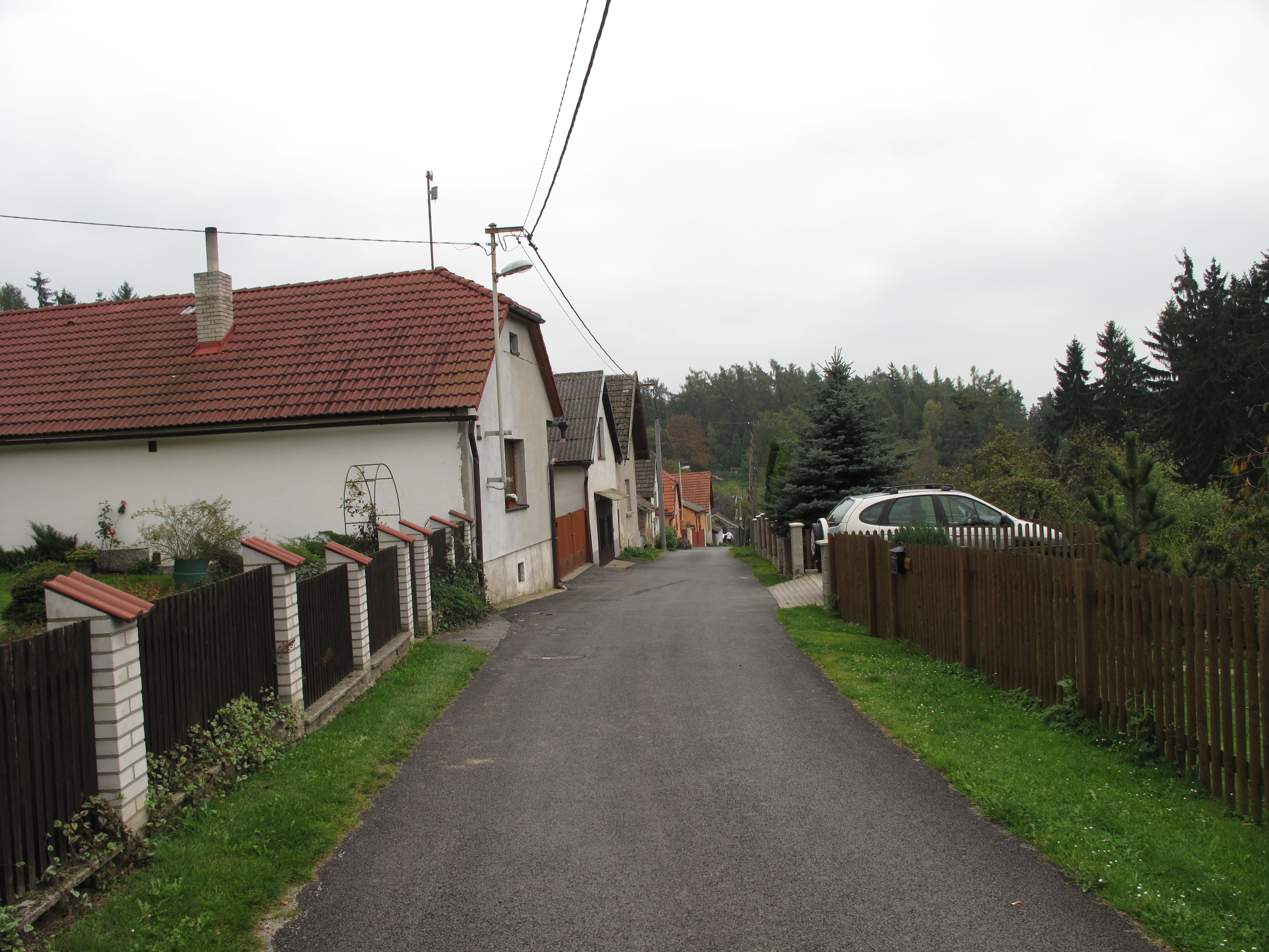 Ulice v Lipině u Veliše. Okres Benešov, Česká republika.